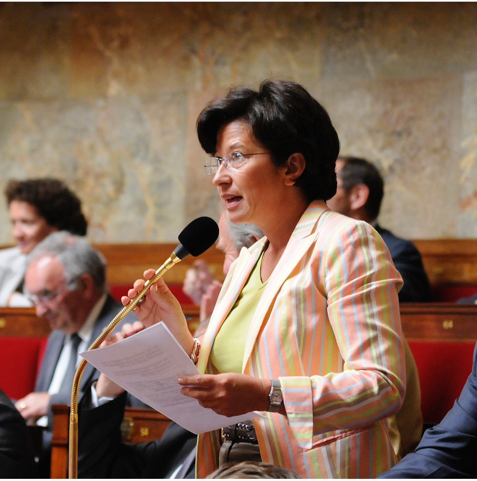 véronique Besse député de Vendée